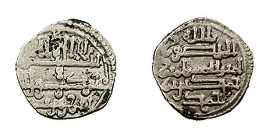 Quirate de plata acuñado por Hamdin e Ibn Wazir, caudillos sublevados en el oeste de Al-Ándalus contra el poder almorávide.